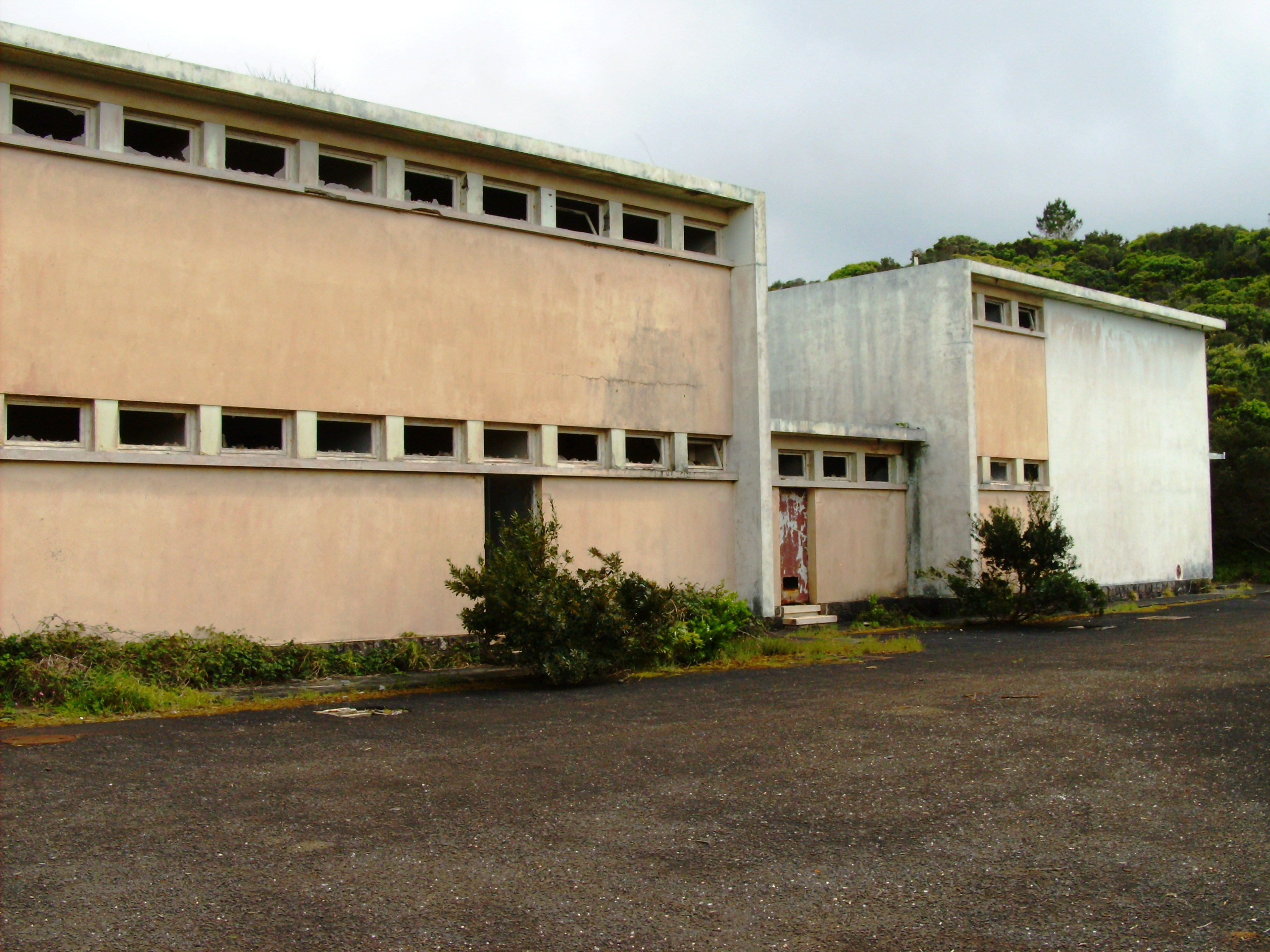 Estação LORAN de Santa Maria, Ilha de Santa Maria (Açores), Portugal.